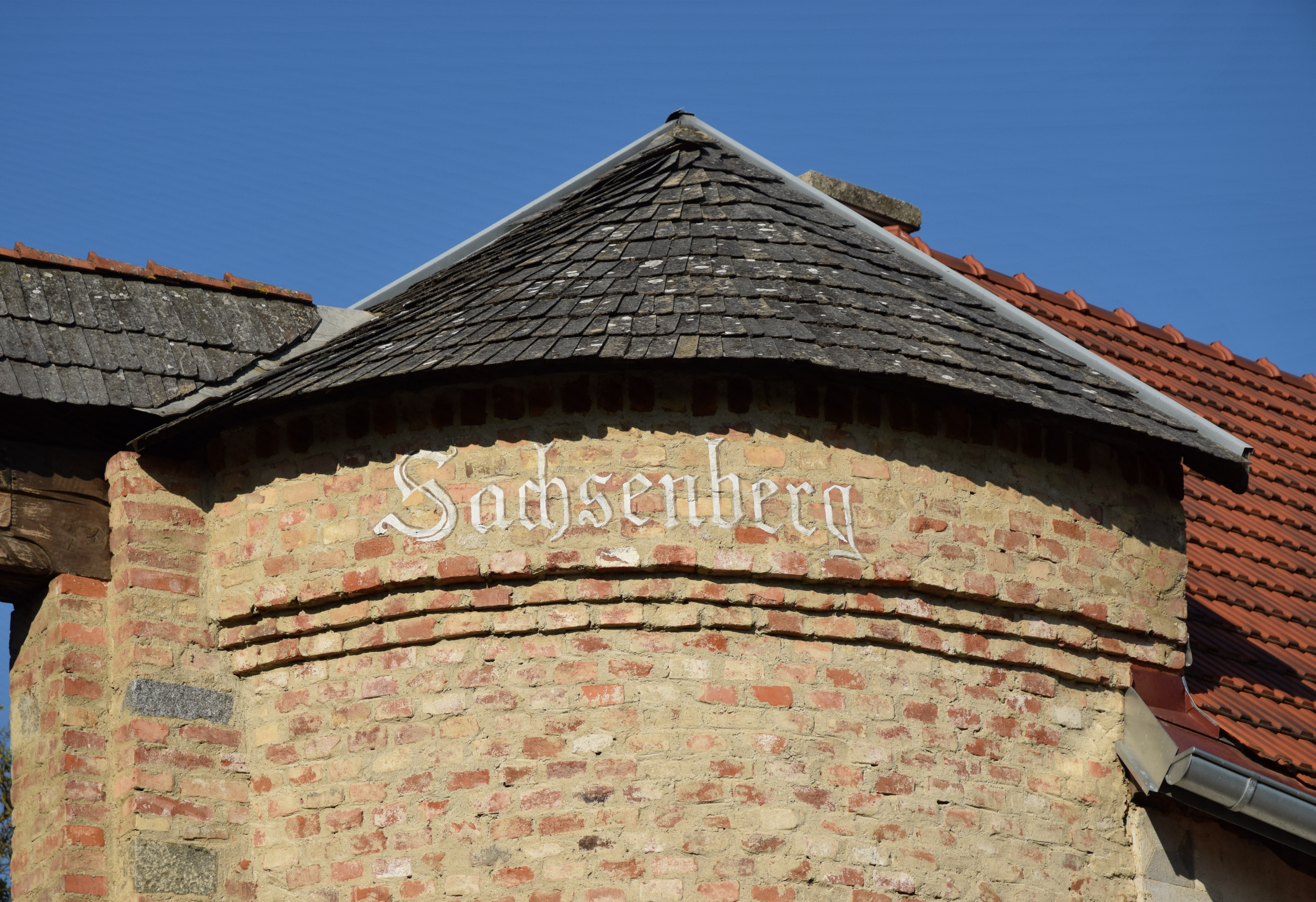 Gedenkstätte an die beginnende Befreiung Wiens während der Türkenbelagerung 1683